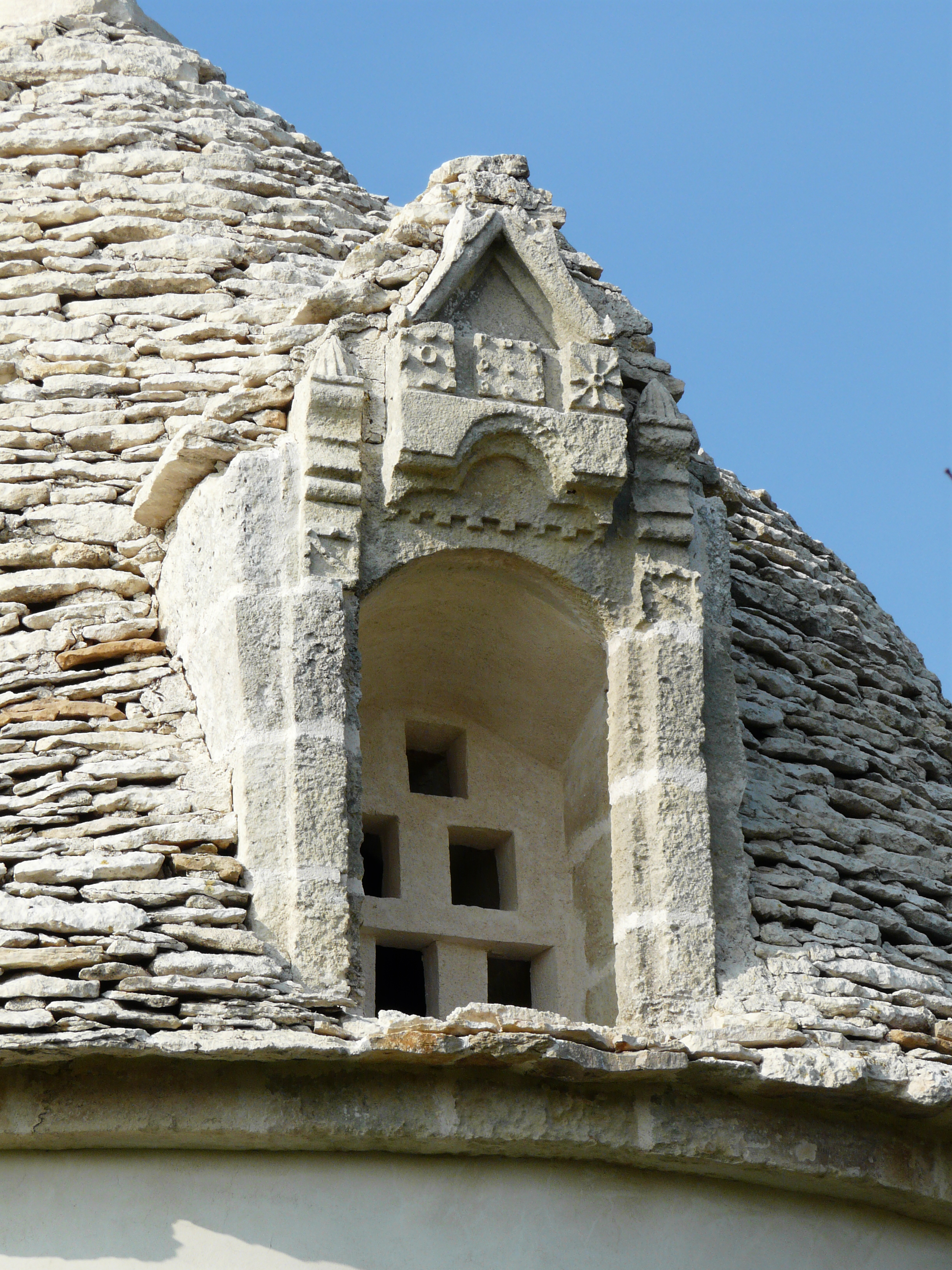 Lucarne du pigeonnier au sud-ouest du village de Paussac, Paussac-et-Saint-Vivien, Dordogne, France.